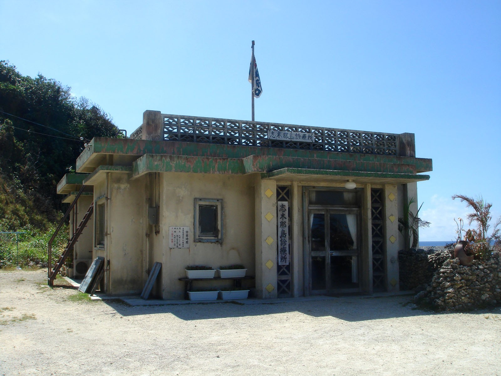 Shikina-jima Shinryoj0 (Shikinajima Island Clinic - a set for TV drama "Dr. Koto Shinryojo"), Yonaguni Island (Yonaguni Town), Okinawa, Japan